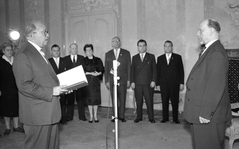 Berlin, Staatsrat empfing Deutschen Städte- und Gemeindetag Zentralbild/Zühlsdorf 22.9.1960 Staatsrat empfing Deutschen Städte- und Gemeindetag. Der Vorsitzende des Staatsrats, Walter Ulbricht, empfing am 22.9.1960 im Amtssitz des Staatsrates in Berlin-Niederschönhausen die Mitglieder des Präsidiums des Deutschen Städte- und Gemeindetages. UBz: Während des Empfangs vorn rechts: Der Vorsitzende des Staatsrates, Walter Ulbricht; vorn links: der Präsident des Deutschen Städte- und Gemeindetages, Oberbürgermeister Friedrich Ebert, Berlin; Hinten stehend von links nach rechts: Oberbürgermeister Max Richter, Stalinstadt; Stadtverordnete Liselotte Butte, Bad Sülze; Kreistagsabgeordneter Herbert Gust, Demmin; Oberbürgermeister Maria Dank, Dessau; Kreisratsvorsitzender Paul Löschke, Hagenow; Bürgermeister Otto Tews, Rehna; Gemeinderat Rosemarie Flesch, M.d.V., Rüdersdorf; Oberbürgermeister Luitpold Steidle, M.d.V., Weimar; Stellv. Oberbürgermeister Martin Kirchhof, Halle; Geschäftsführer Dr. Linus Stiegler, Berlin. [2teiliges Motiv] Abgebildete Personen: Ebert, Friedrich: Oberbürgermeister von Berlin, DDR Ulbricht, Walter: Staatsratsvorsitzender, Erster Sekretär des Zentralkomitees (ZK) der SED, Vorsitzender des Nationalen Verteidigungsrates, DDR Steidle, Luitpold Dr.: Minister für Gesundheitswesen, Volkskammerabgeordneter, Oberbürgermeister Weimar, DDR